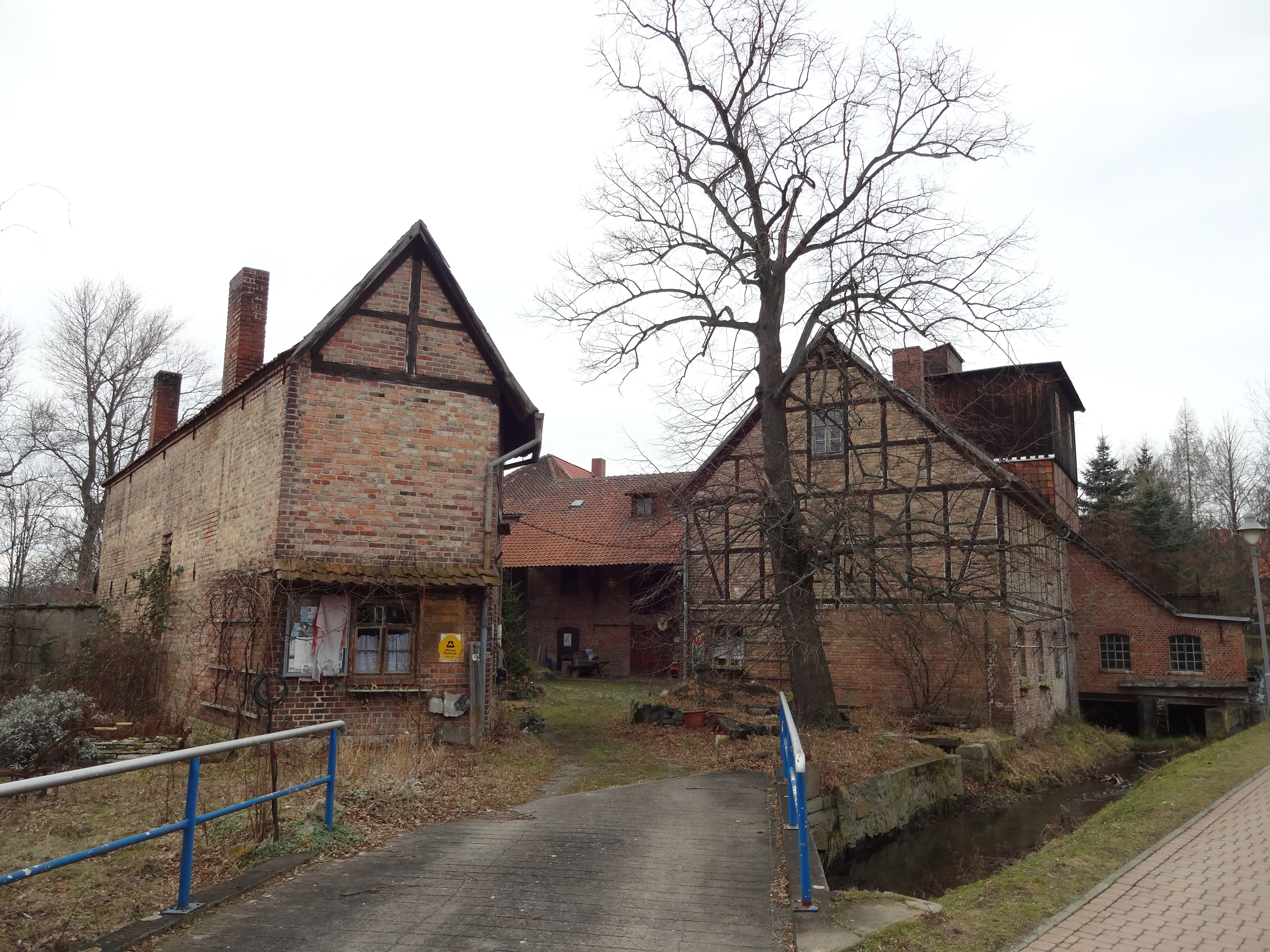 Kulturdenkmal in Minsleben, Ortsteil von Wernigerode